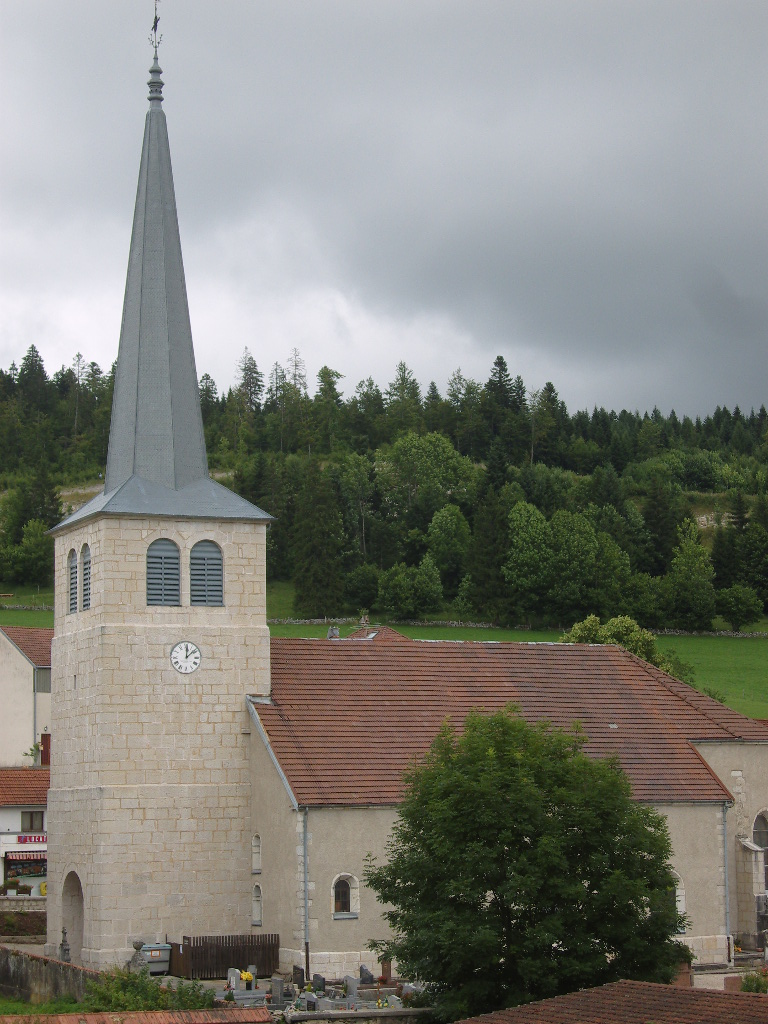 Eglise des Hôpitaux-Neufs datant de 1694